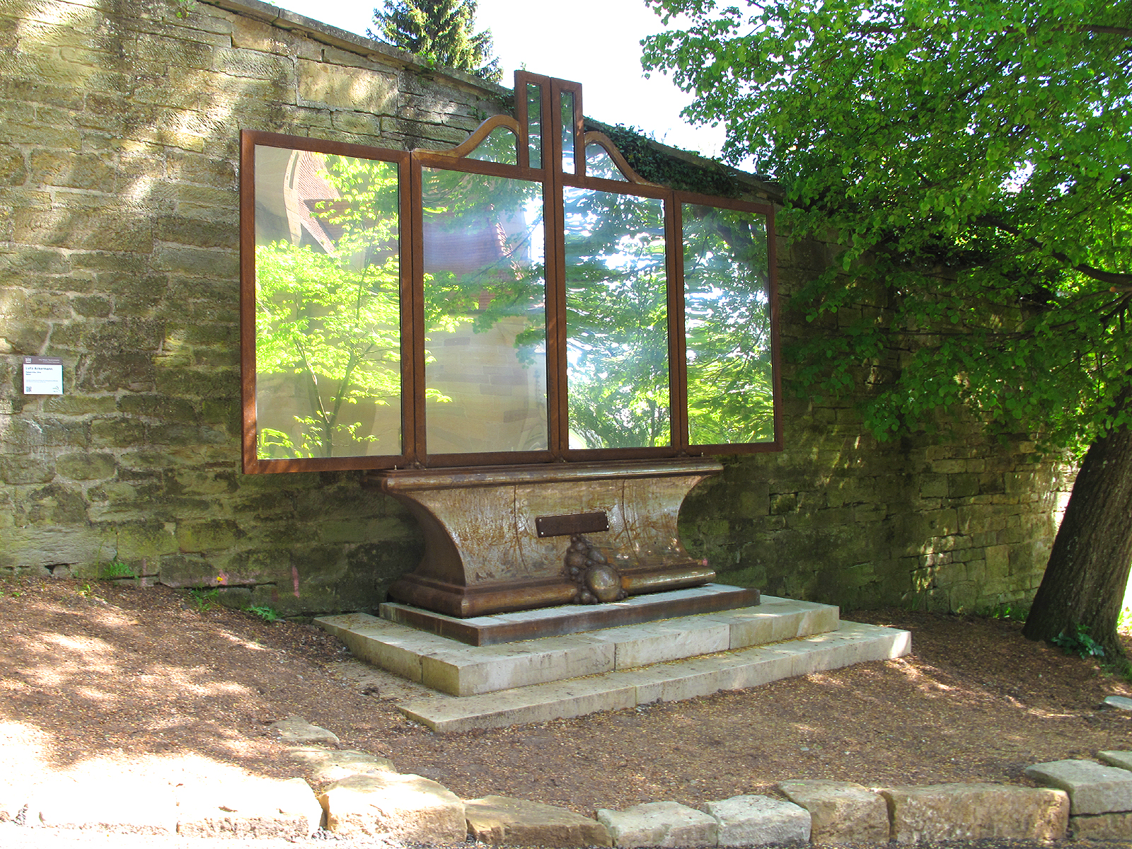 Lutz Ackermann, Ratgeb-Altar, 2014, - Deutschland, Baden-Württemberg, Herrenberg, Jerg Ratgeb Skulpturenpfad - bei der Stiftskirche